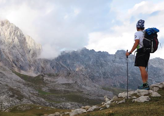 Una de las últimas fotografías tomadas por Marinho en los Picos de Europa y la última subida a su cuenta personal de Instagram.